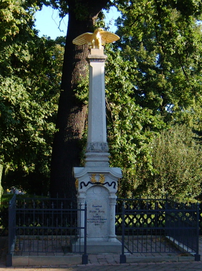 Das Kriegerdenkmal in